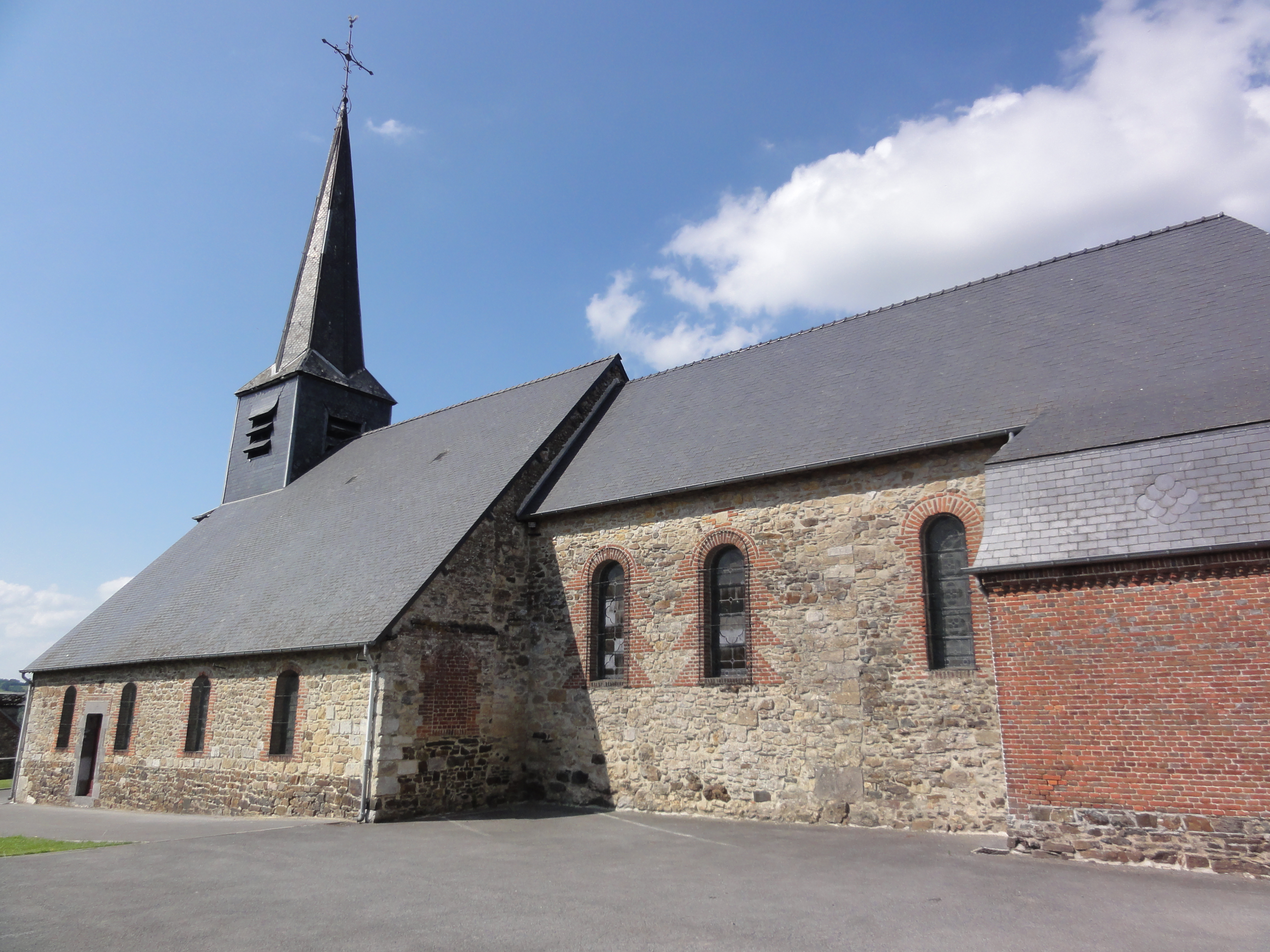 Neuve-Maison (Aisne) église